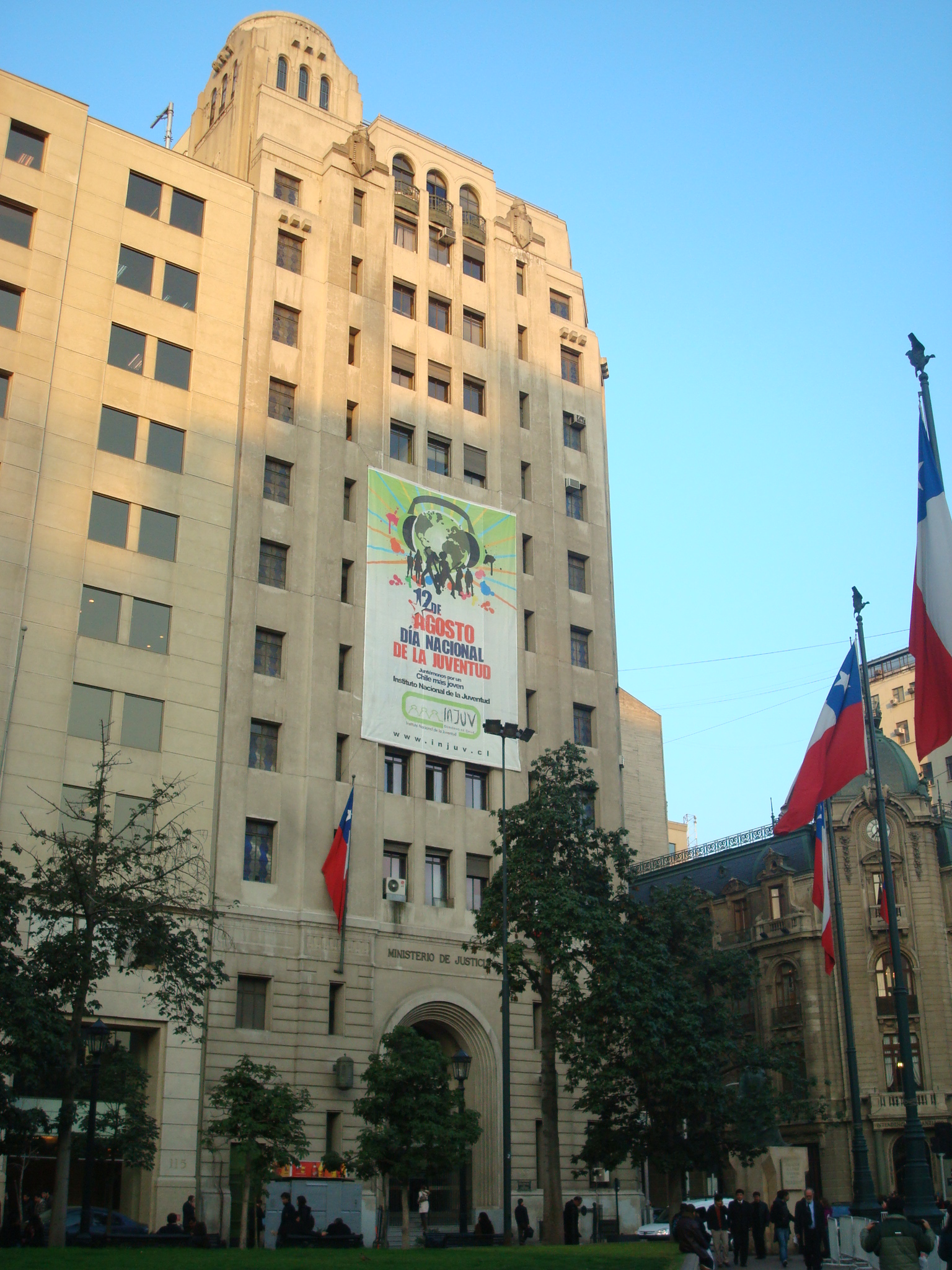 Edificio del Ministerio de Justicia, Chile